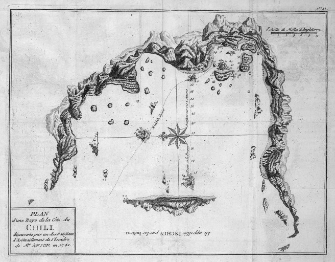 [Illustrations de Voyage autour du monde] Auteur : George Anson Éditeur : Henri-Albert Gosse et Compagnie (Genève) 1750